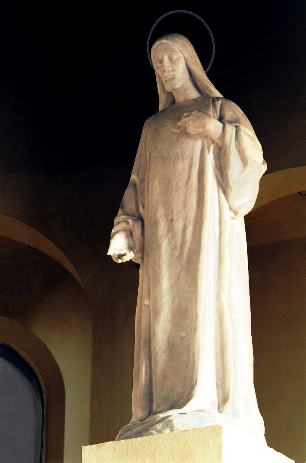 Álló Krisztus szobra (Vastagh Éva szobra), Jézus szíve templom, Kápolnásnyék, Fejér megye